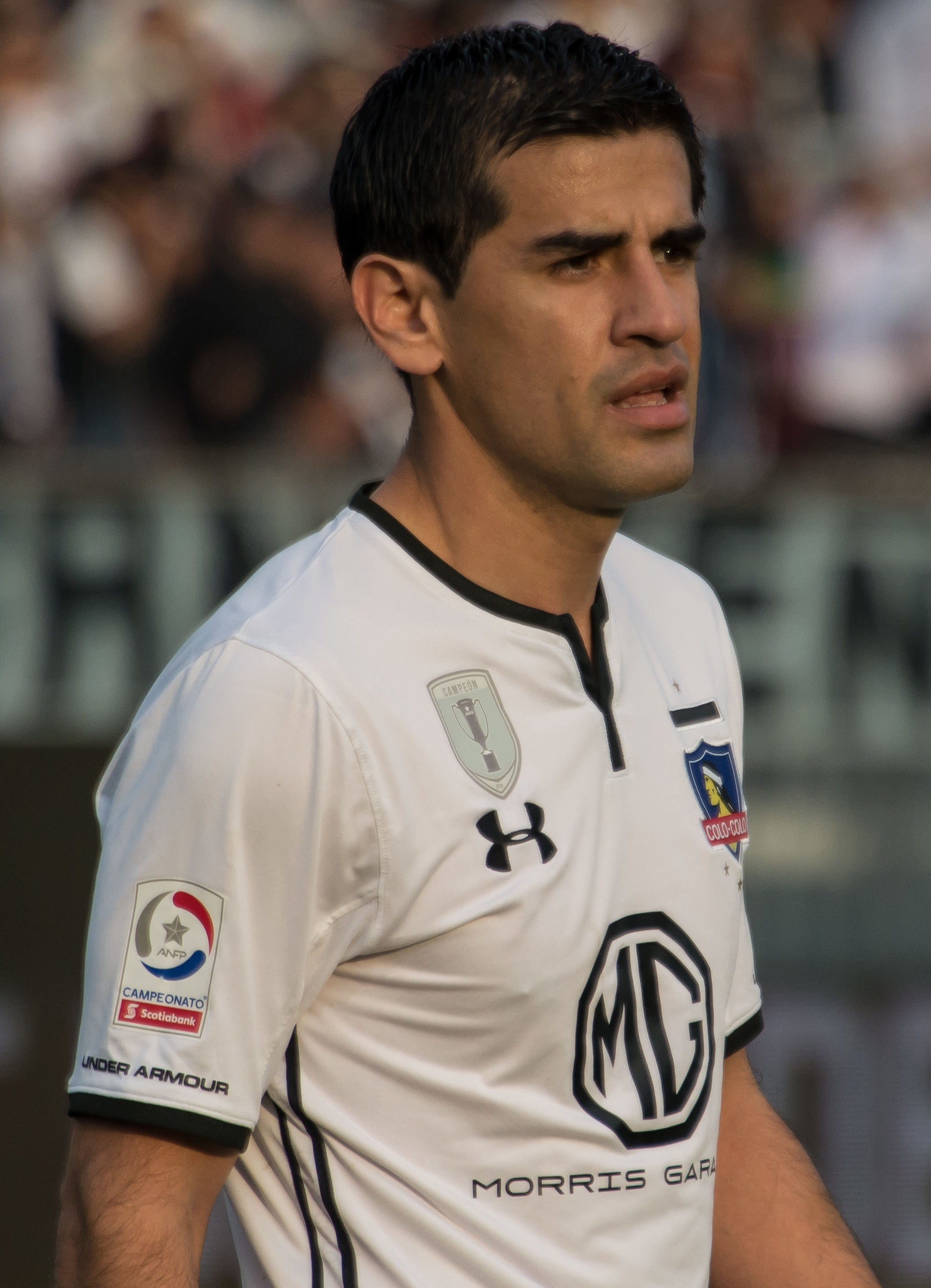 Julio Barroso, Colo-Colo v San Luis, Estadio Monumental, Macul, Santiago, Chile.